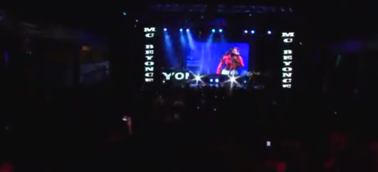 MC Beyoncé ternate uma apresentação em 2013